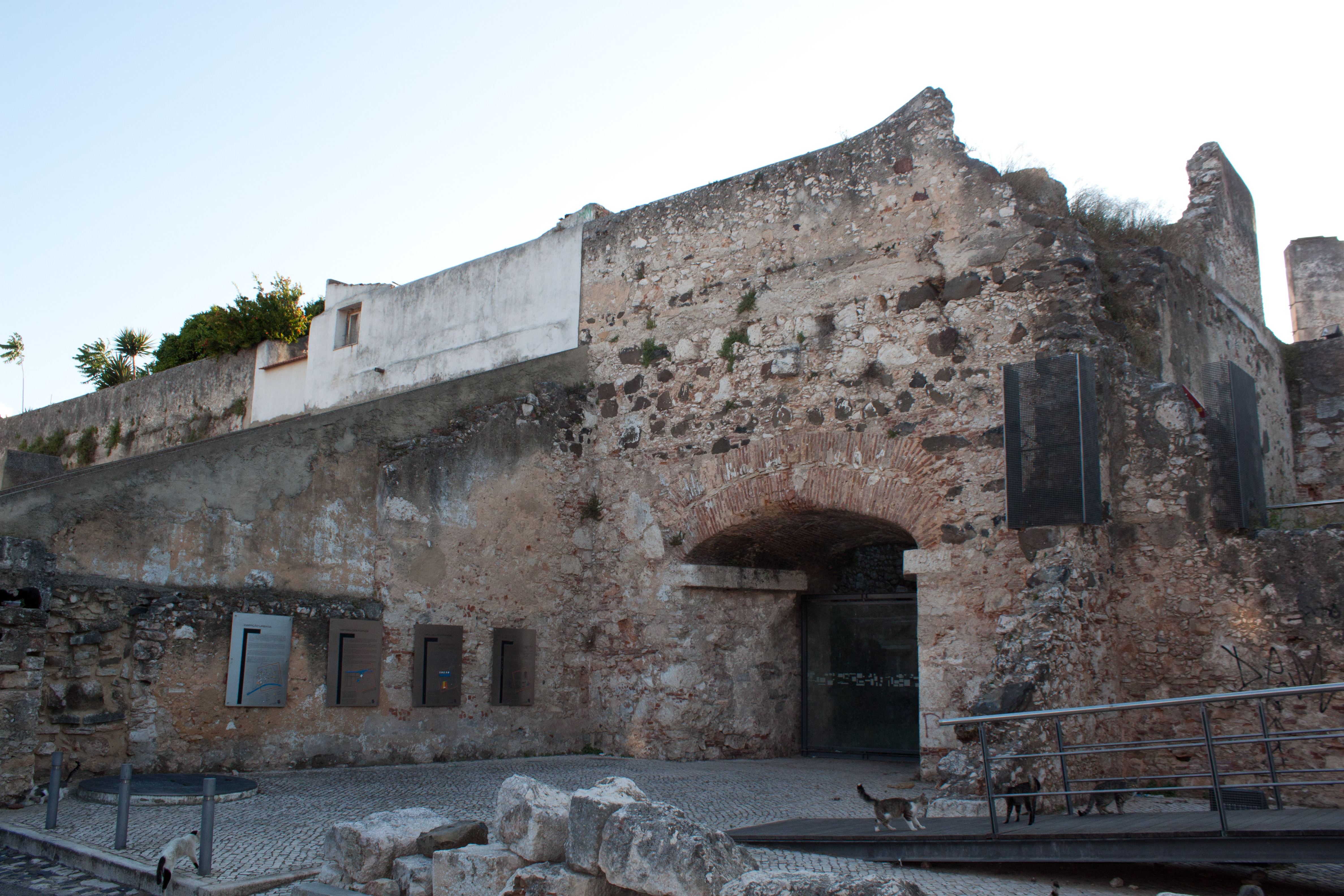 Fornos de Cal - Paço de Arcos